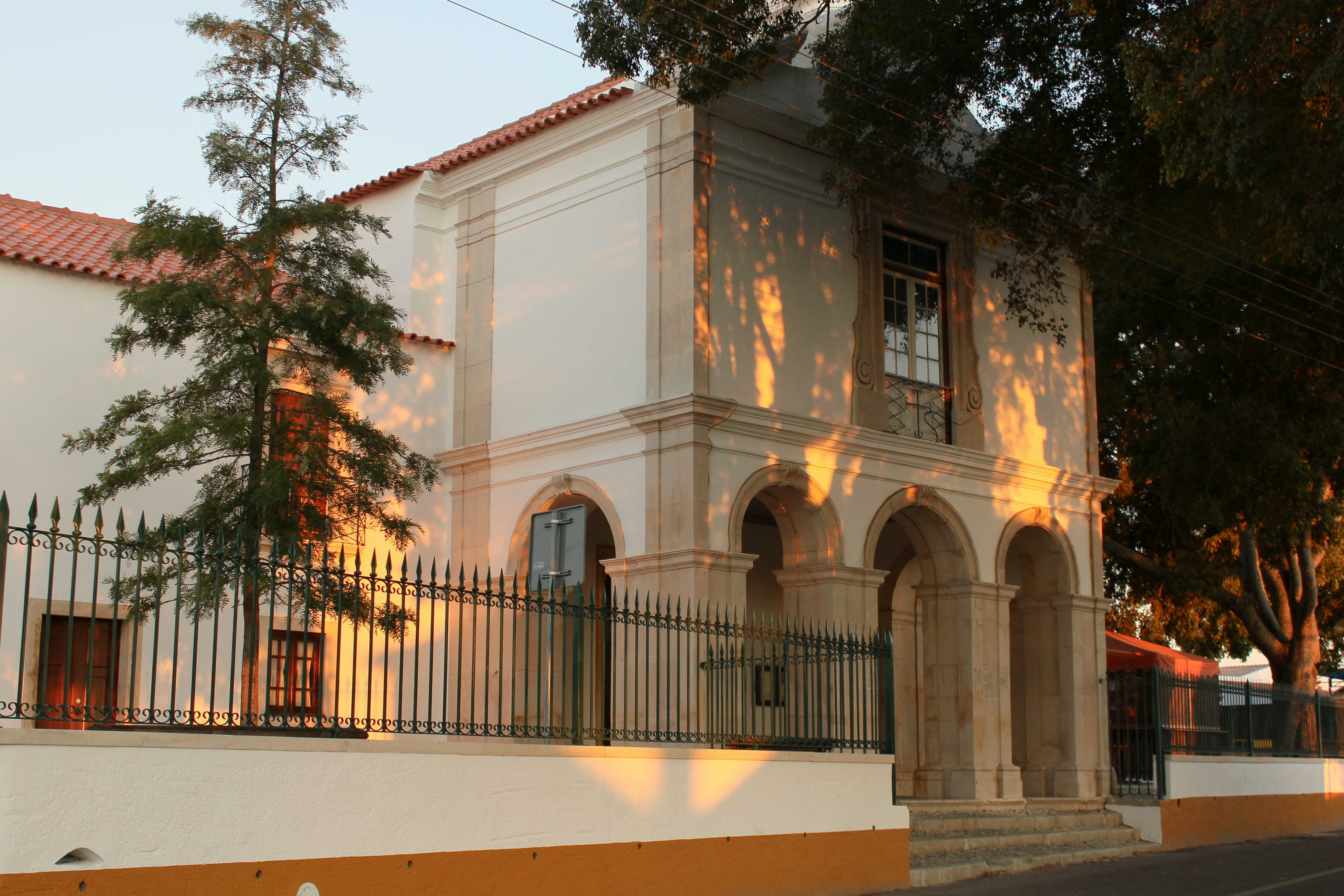 Igreja de Nossa Senhora da Conceição ou Igreja Matriz das Abitureias This file was uploaded for Wiki Loves Monuments in Portugal with the unique identifier 70867.